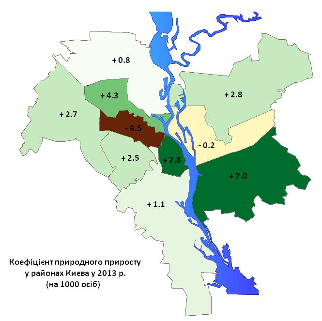 Коефіцієнт природного приросту населення районів Києва у 2013 р. (на 1000 осіб) / Natural population growth in raions of Kyiv in 2013 (per 1000)